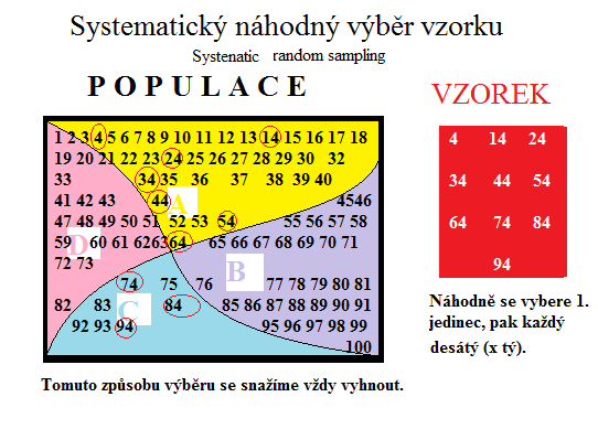 Systematický náhodný výběr